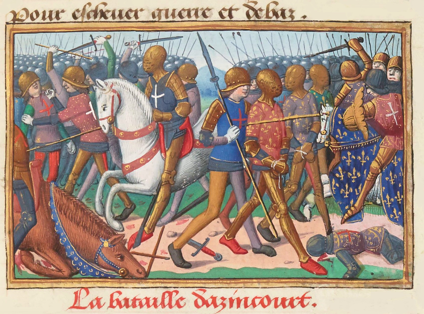 Bataille d'Azincourt (1415).